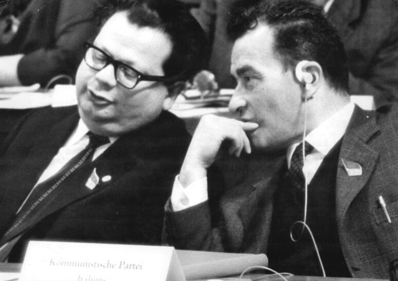 Zentralbild Junge 19.4.1967 VII. Parteitag der SED - 18.4.1967. Der Kandidat des Politbüros des ZK der SED, Hermann Axen (links), und das Mitglied des Politbüros der Kommunistischen Partei Italiens, Pietro Ingrao.